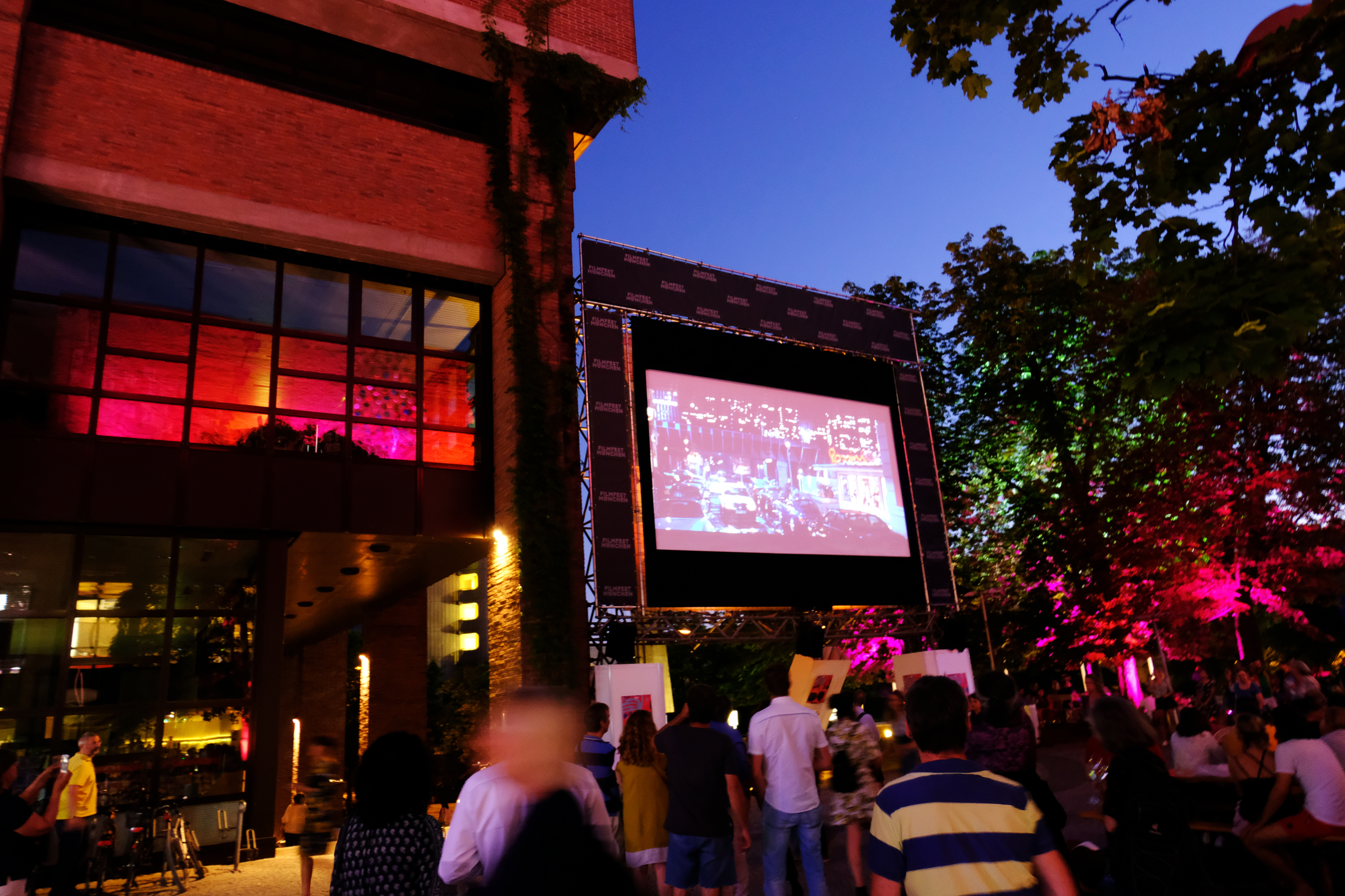 Open-Air-Vorstellung von „Rossini – oder die mörderische Frage, wer mit wem schlief“ von Helmut Dietl während des Münchner Filmfests (2019)